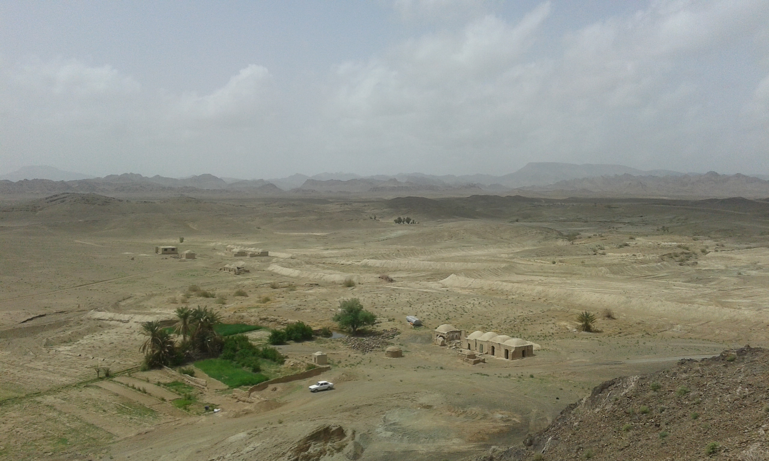 عکس از قسمت کلاته بیدکبکان